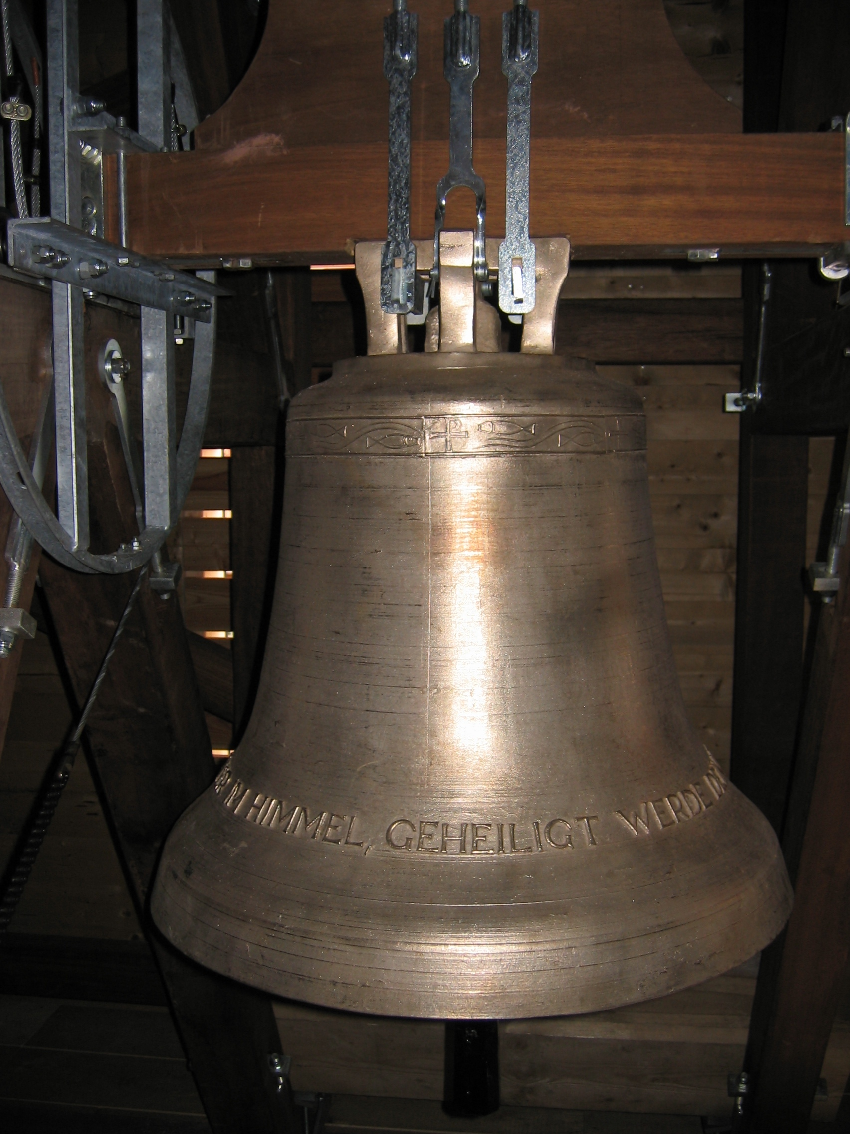 Große Glocke der Auferstehungskirche zu Köln-Sürth